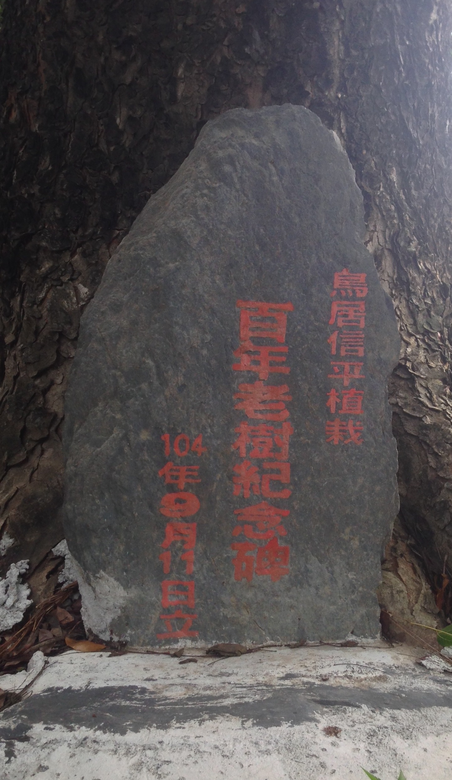 來義鄉台糖萬隆機庫旁鳥居信平植栽百年老樹紀念碑